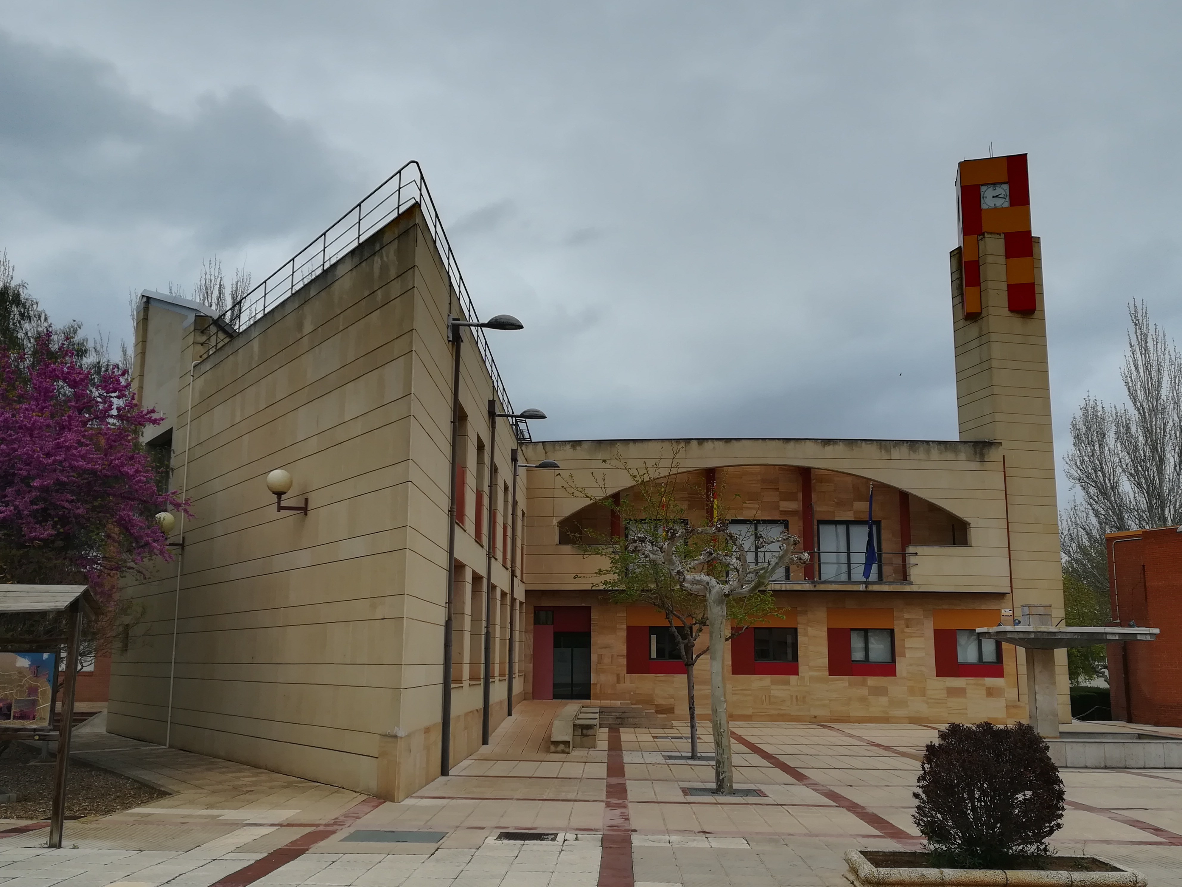 Figueruelas